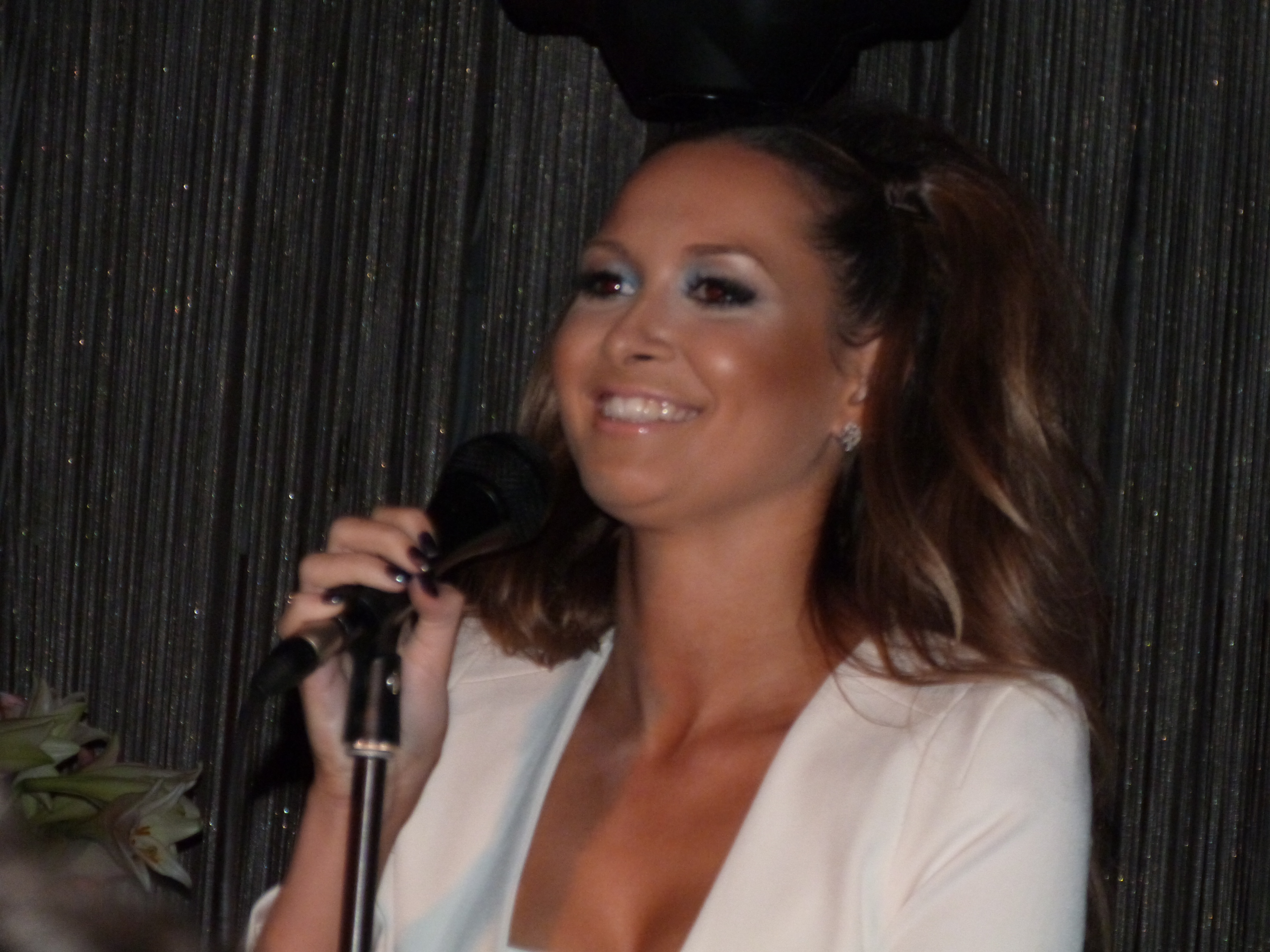 Capristo im Stage Club am 23. Sep. 2012